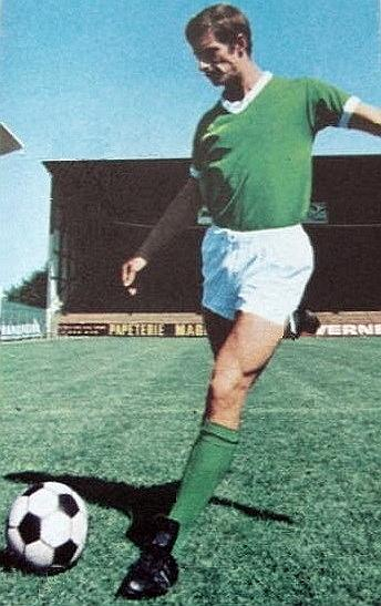 Jean-Michel Larqué en 1971, 'Ageducatifs Football en Action 1971 - 1972', Panini figurina n°256.